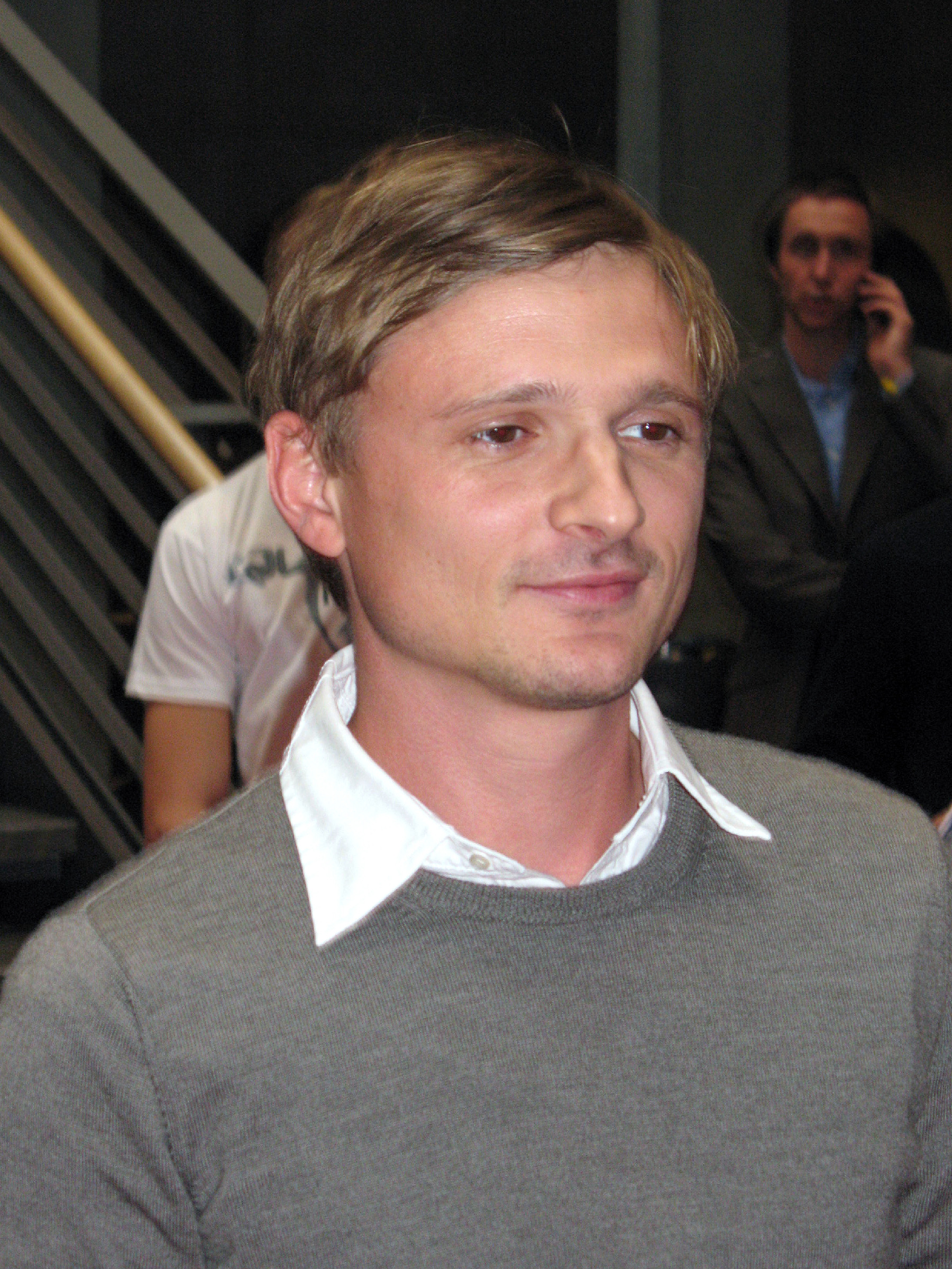 Florian Lukas bei der Filmpremiere Max Minsky und ich, Berlin, 2.9.2007